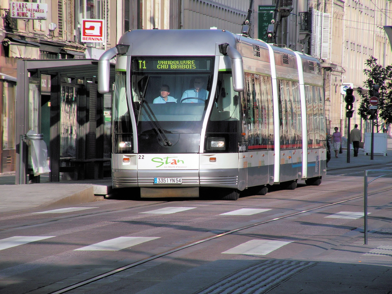 Nancy - Rue Saint-Georges, le fameux tramway sur pneu Uploaded to Flickr: October 31, 2005 Original source: - image description page.